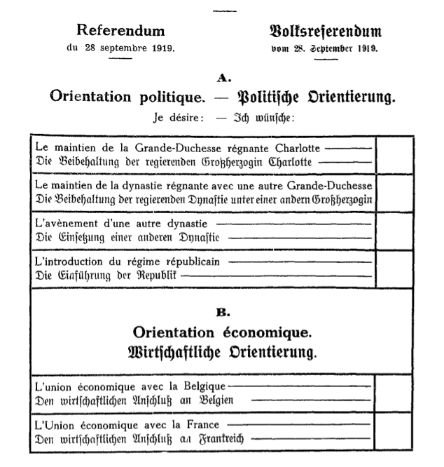 Bulletin de vote utilisé lors du référendum luxembourgeois de 1919